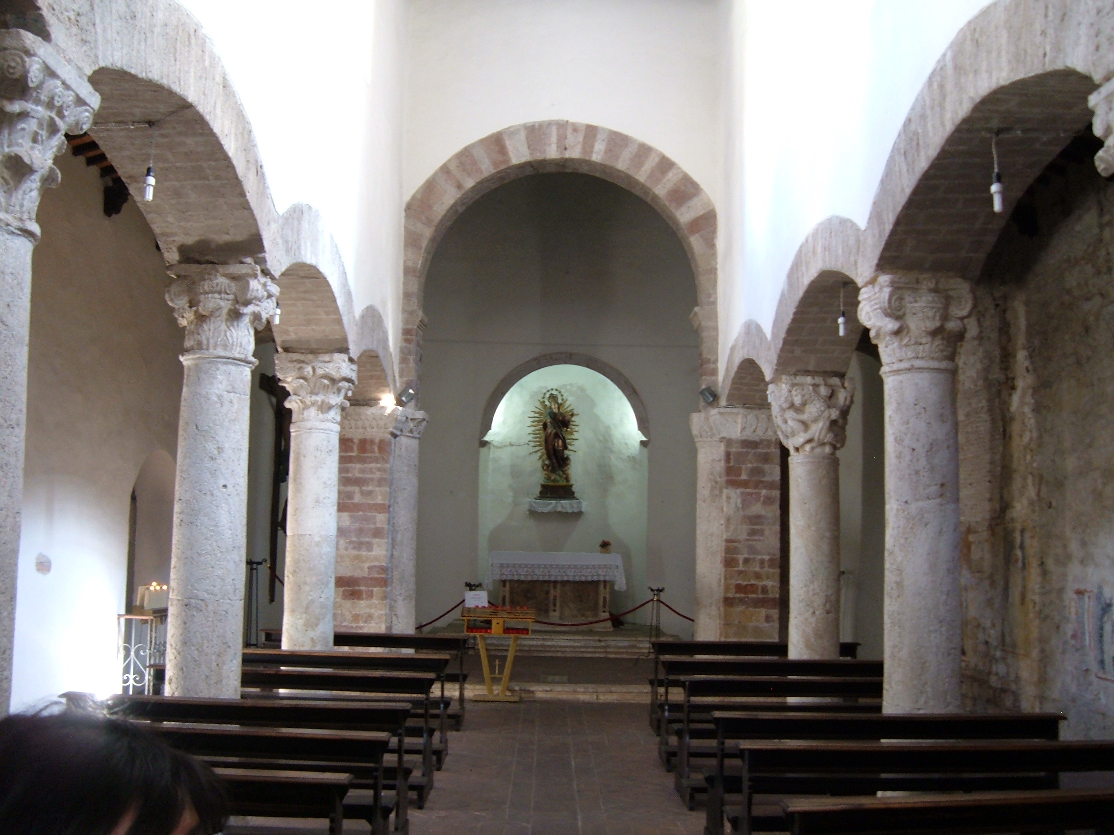 Chiesa di Santa Maria Impensole, a Narni. Interno.